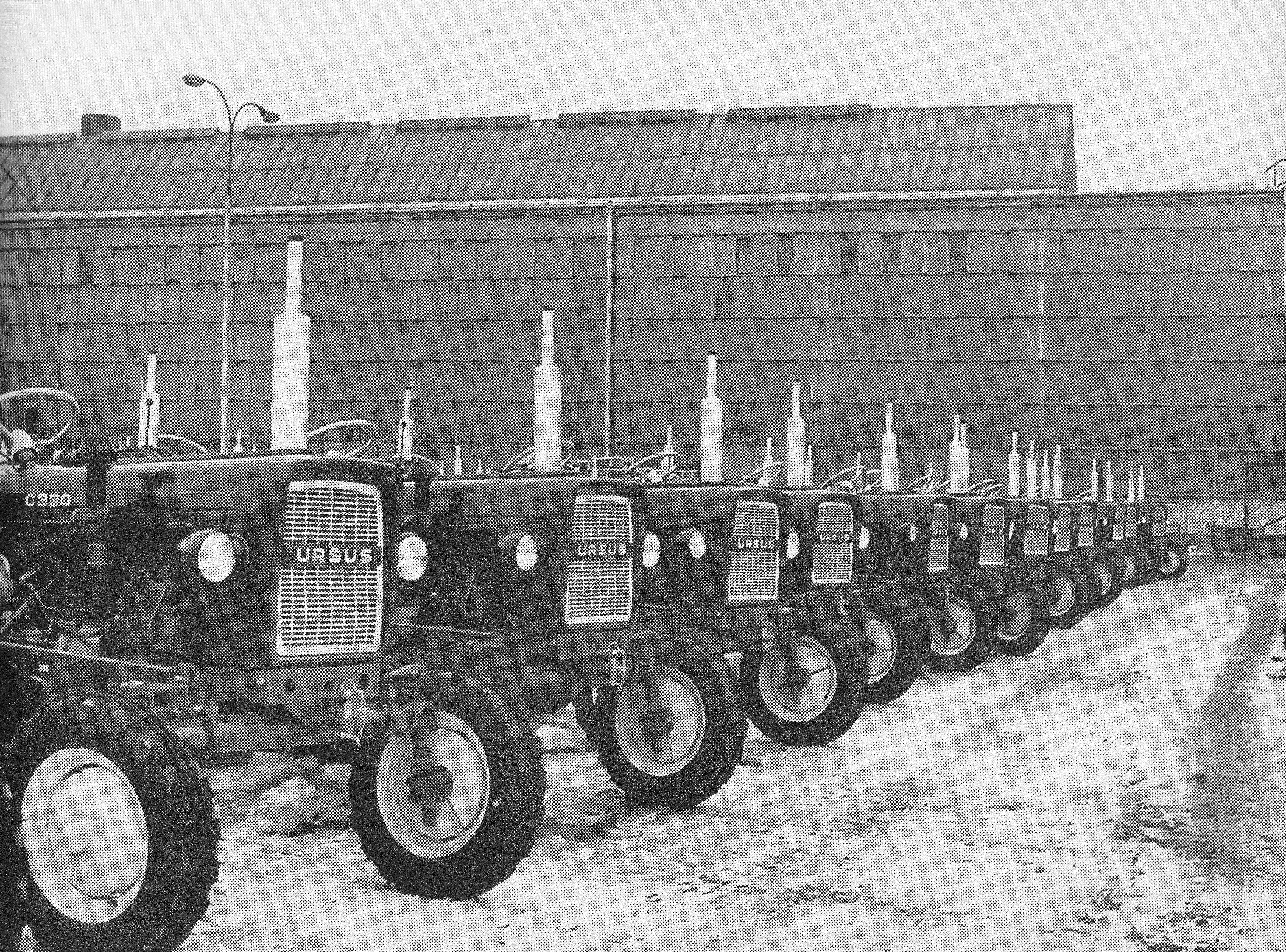 Zakłady Mechaniczne Ursus